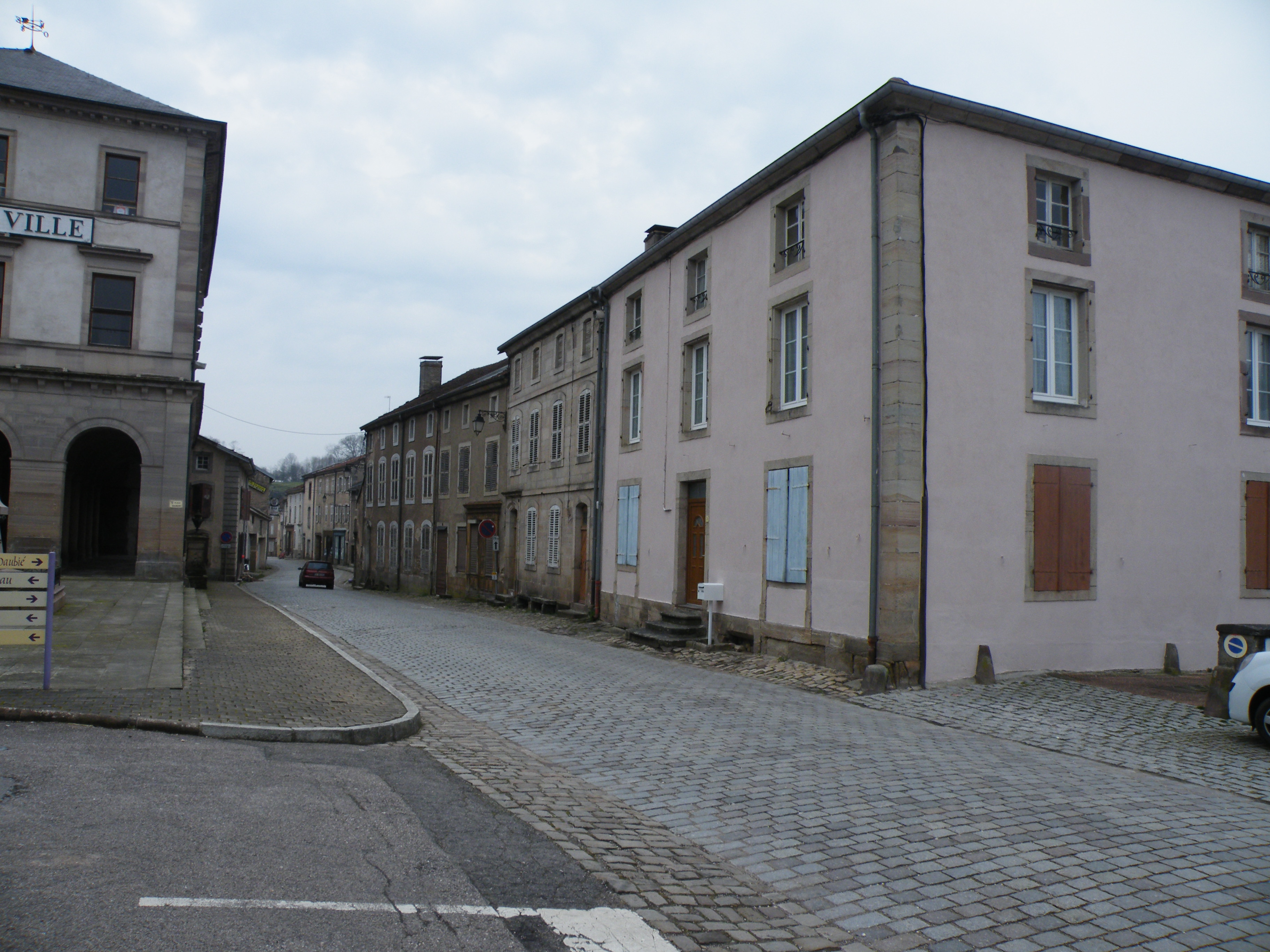 Maison ou J-V Daubié a grandi, place Gilbert à Fontenoy-le-Château